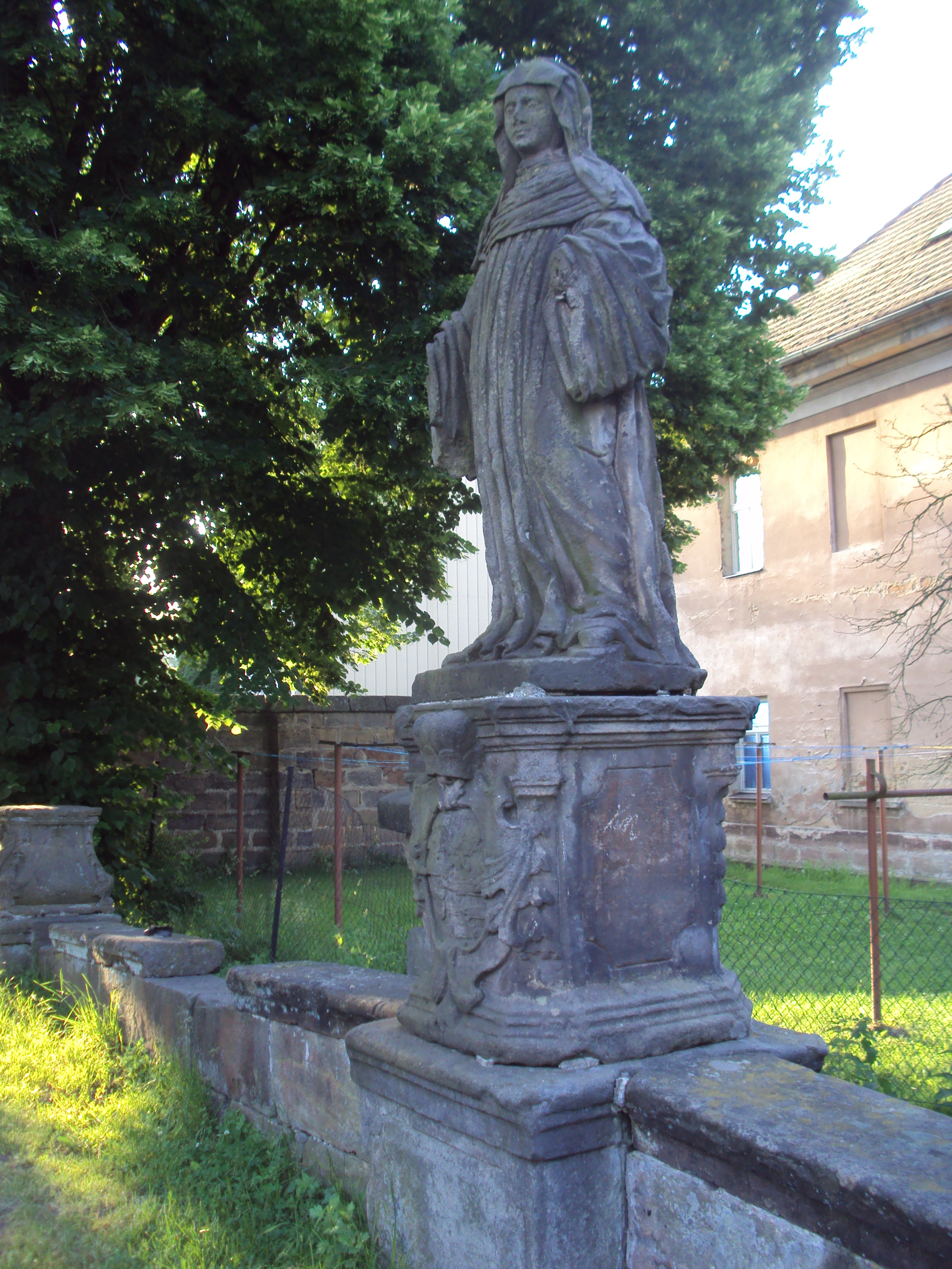 Socha na mostě před klášterem